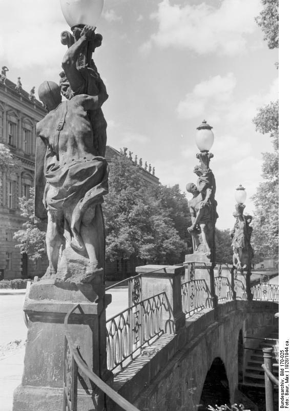 Potsdam.- An der Breiten Brücke